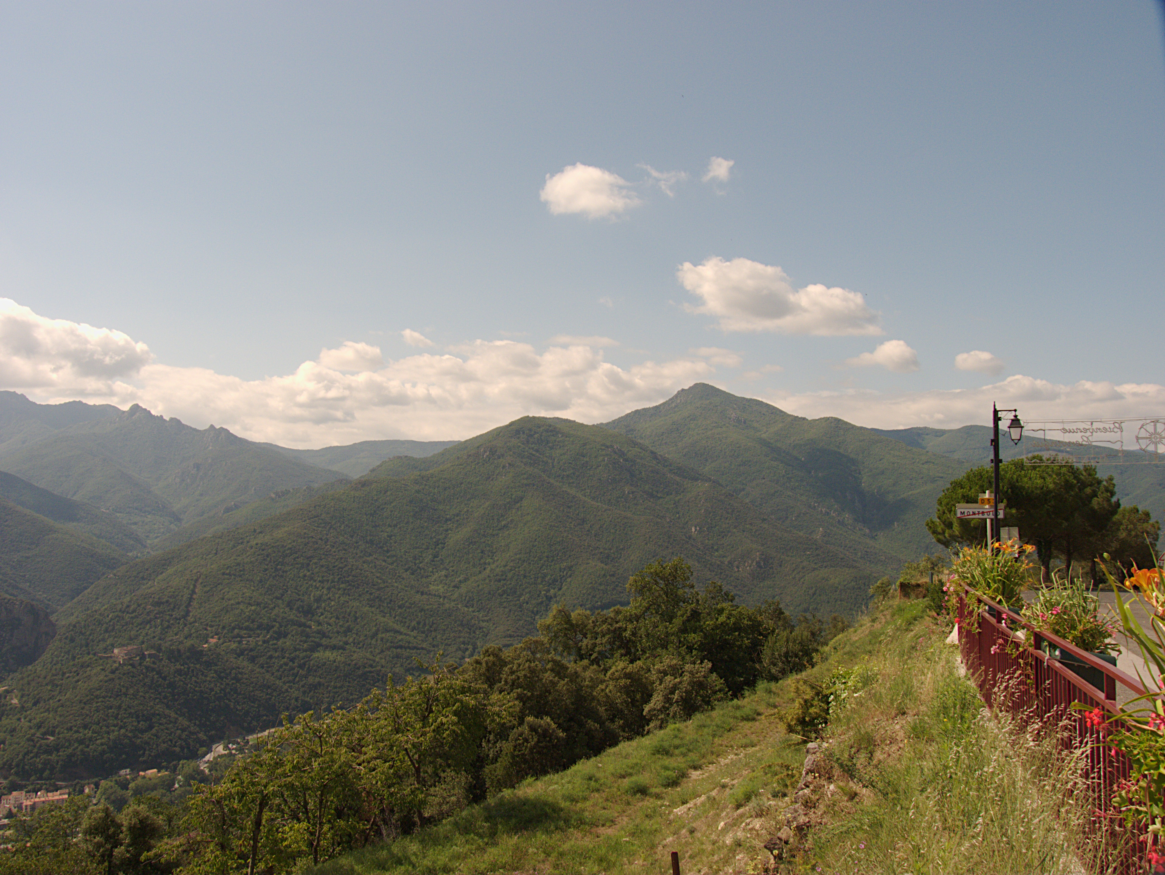 Vue du Piló de Belmaig, Amélie-les-Bains-Palalda, Arles-sur-Tech (Pyrénées-Orientales, Languedoc-Roussillon, France)